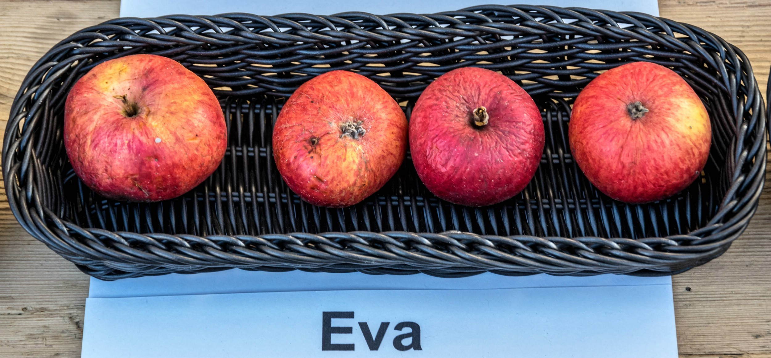 Alte Apfelsorten, von denen es im Badischen noch tragende Bäume gibt. Alle Aufnahmen au dem Oktober 2015